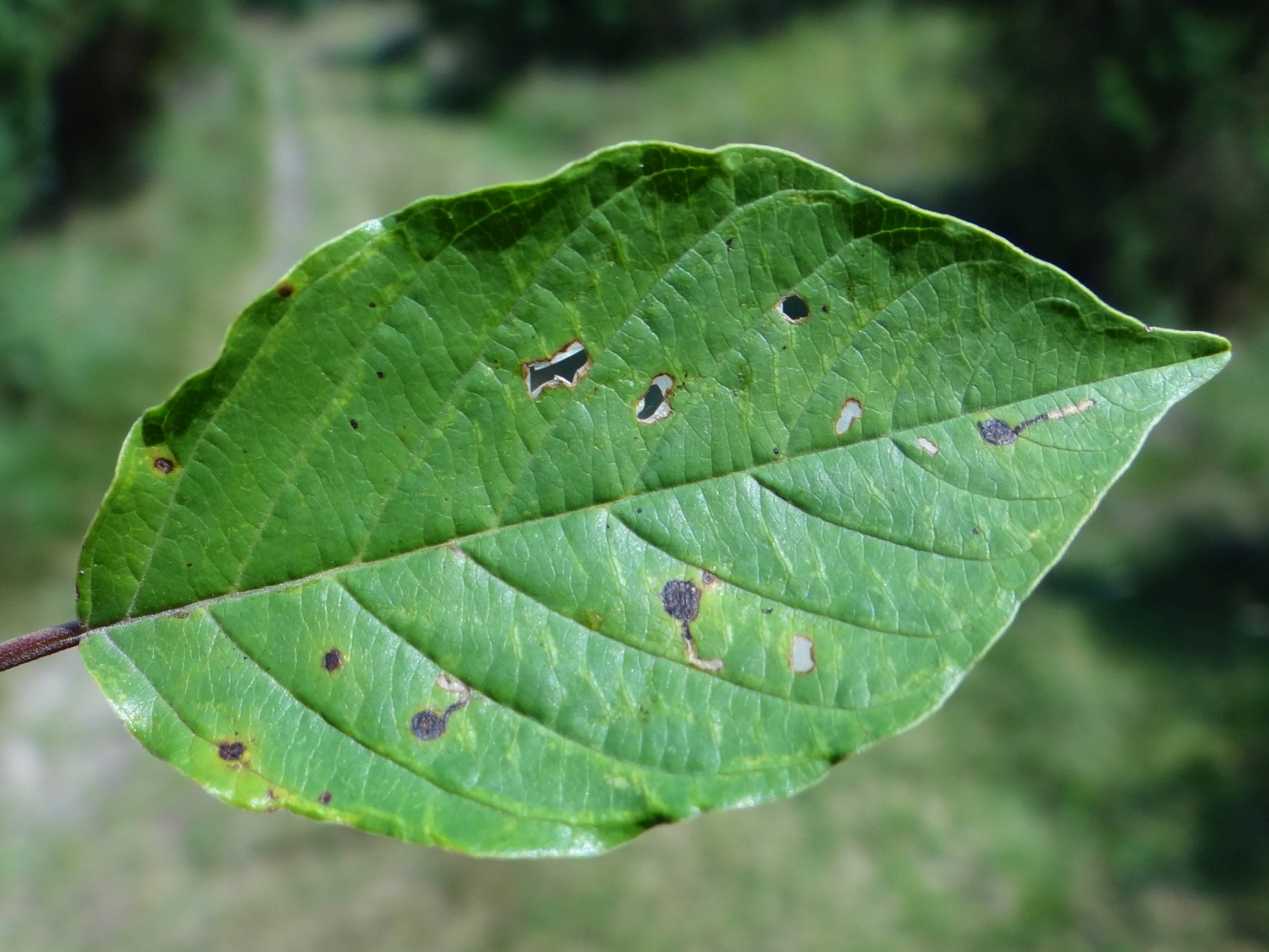 Bucculatrix frangutella. Miner on leaf Frangula alnus. Location: Trzciana (województwo małopolskie)